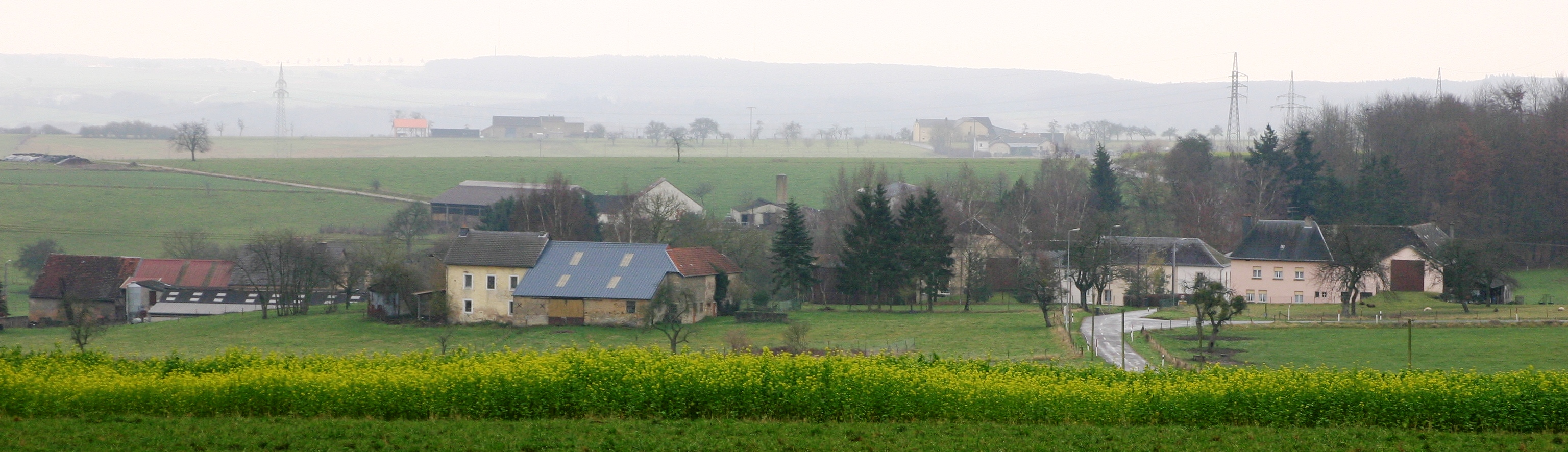 Suewelbuer vum Wee vum Pletschterhaff aus gesinn. Suewelbuer Kategorie:Gemeng Miedernach